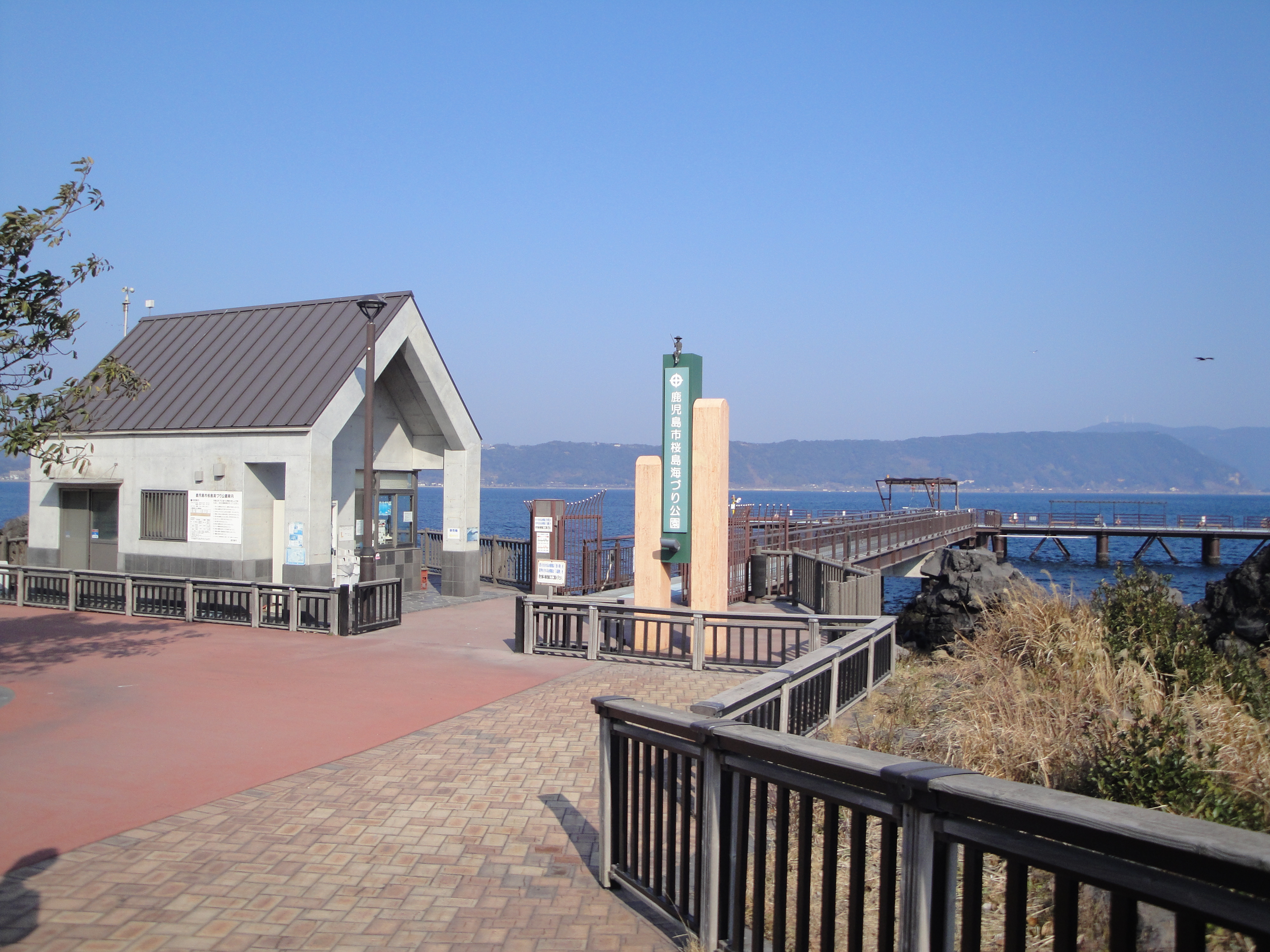 鹿児島市海釣り公園（桜島海釣り公園）の外観。